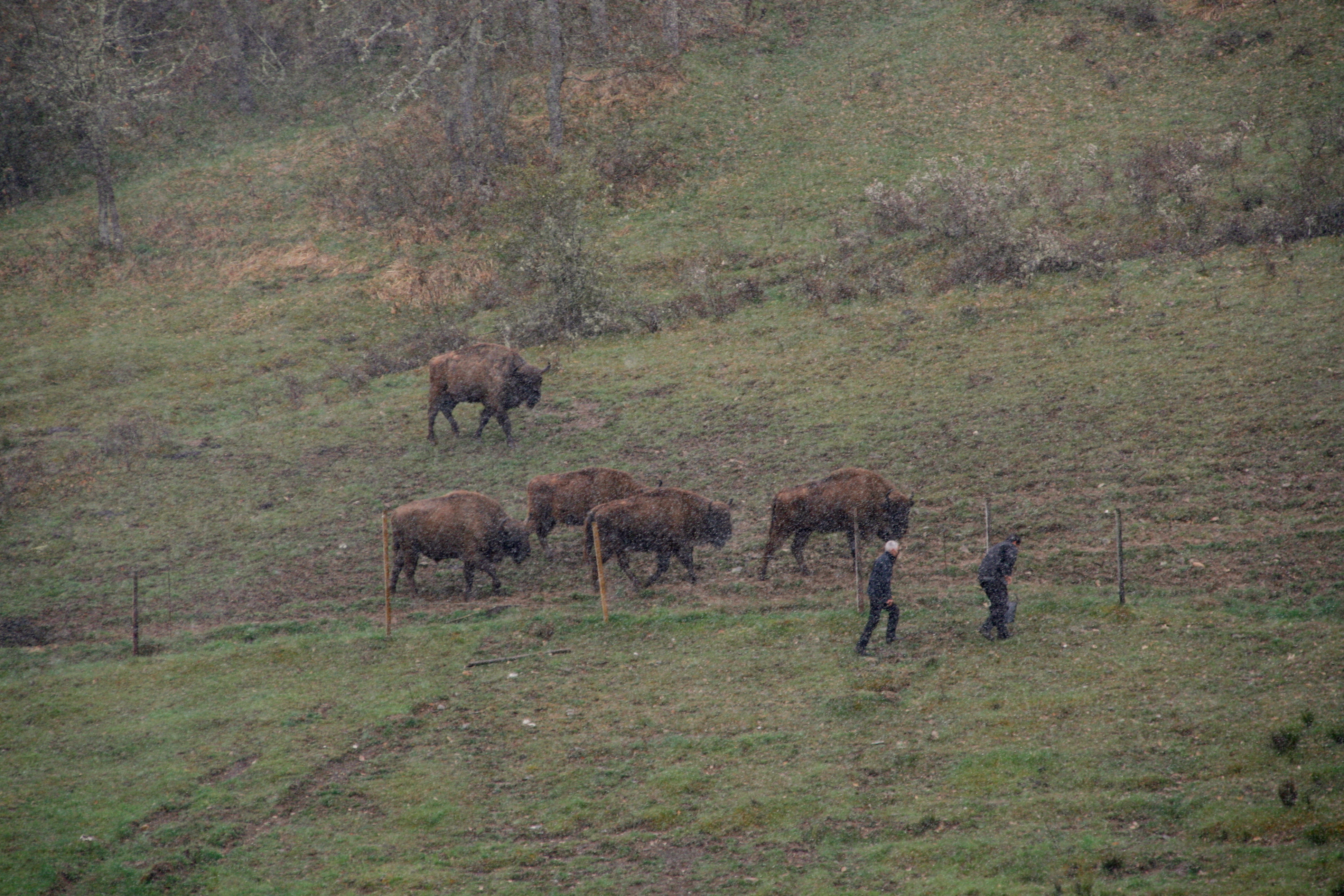 Bisontes europeos en en Bison Bosanus, Reserva y Centro de Interpretación del Bisonte Europeo de San Cebrián de Mudá (Palencia) This is a photography of a Special Area of Conservation in Spain with the ID: ES4140011. Natura2000 entry, EEA entry